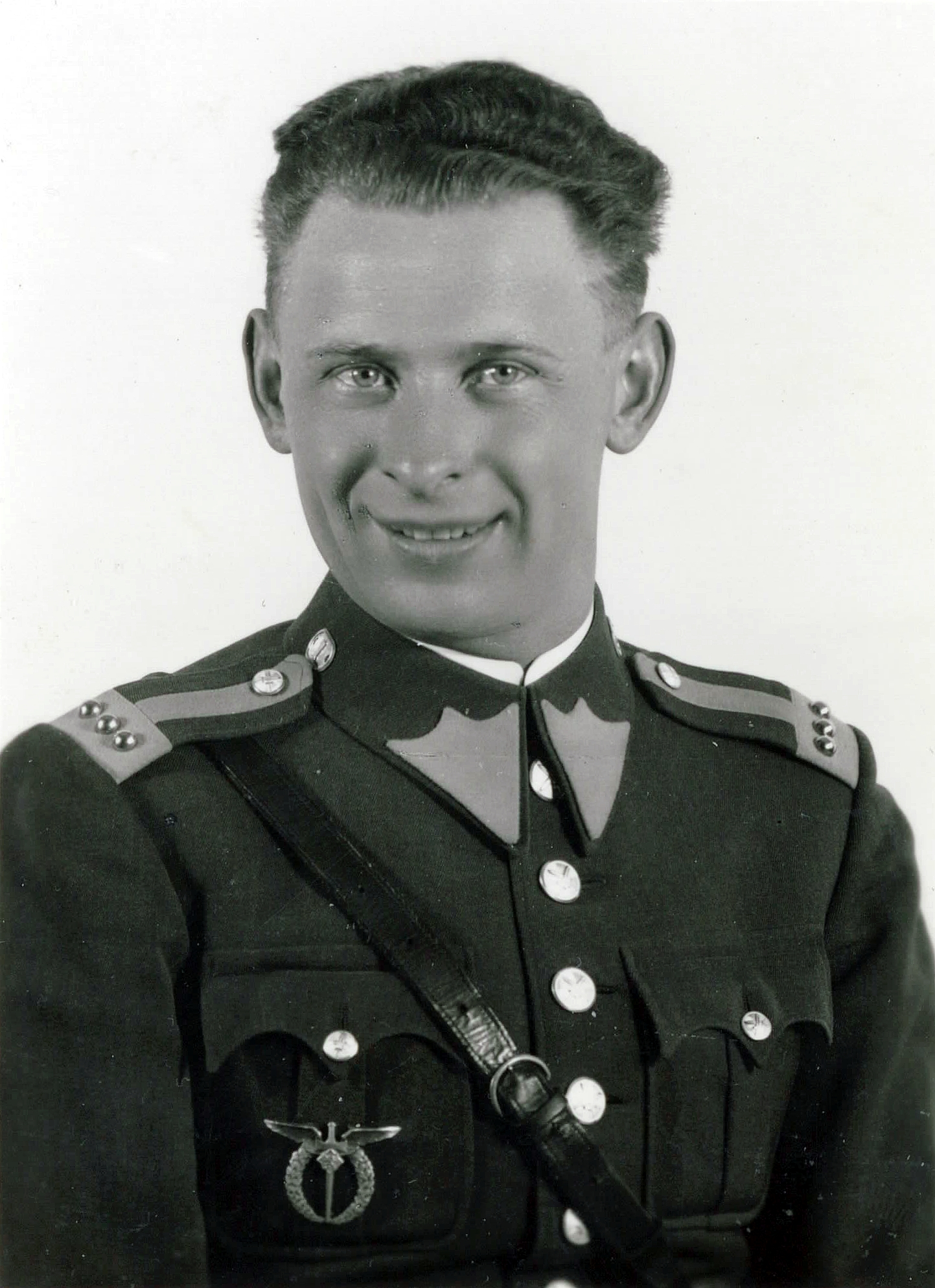 František Taiber v uniformě letectva armády ČSR v hodnosti četař.